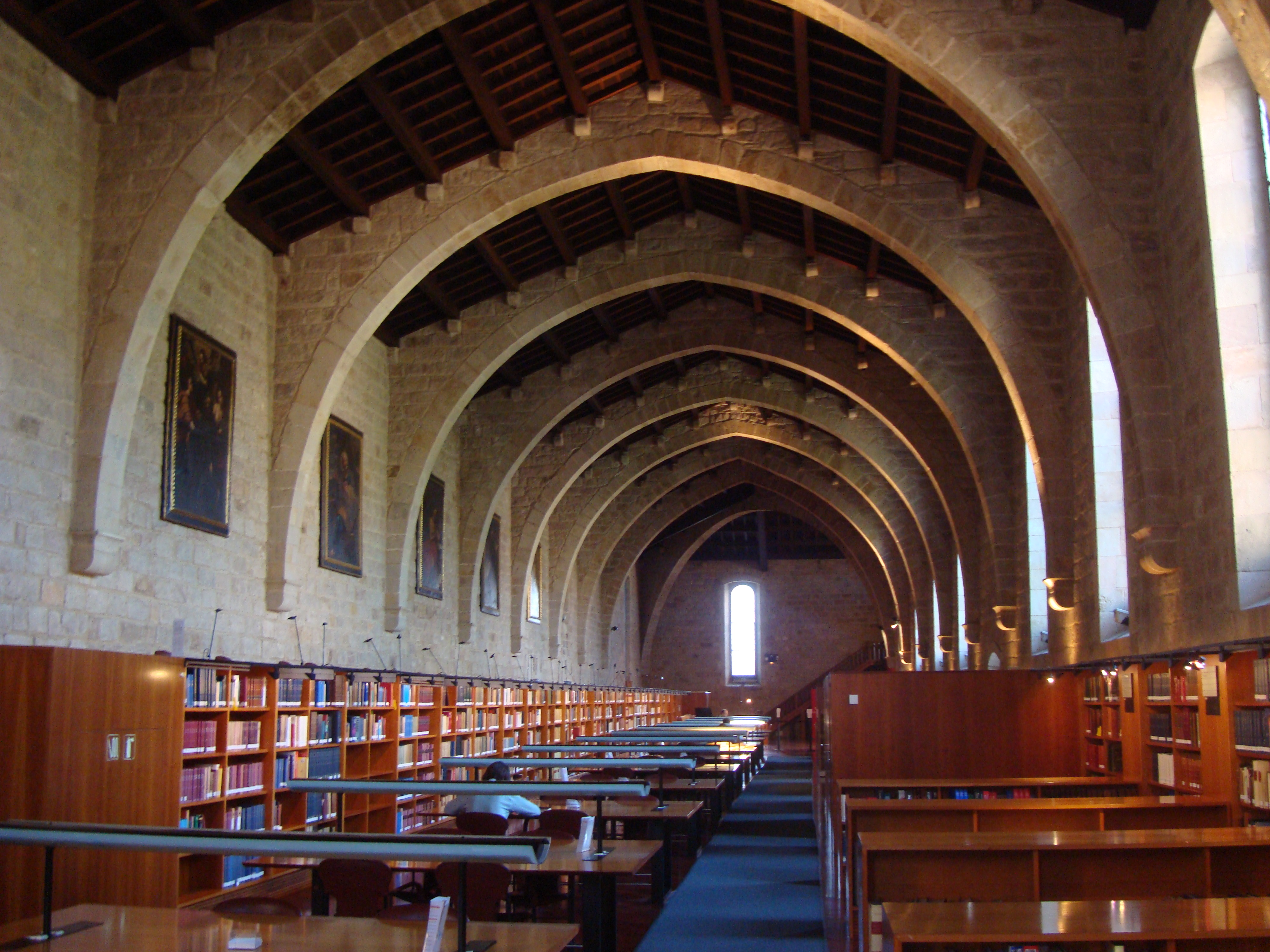 Viquitrobada 2008 - Biblioteca Nacional de Catalunya